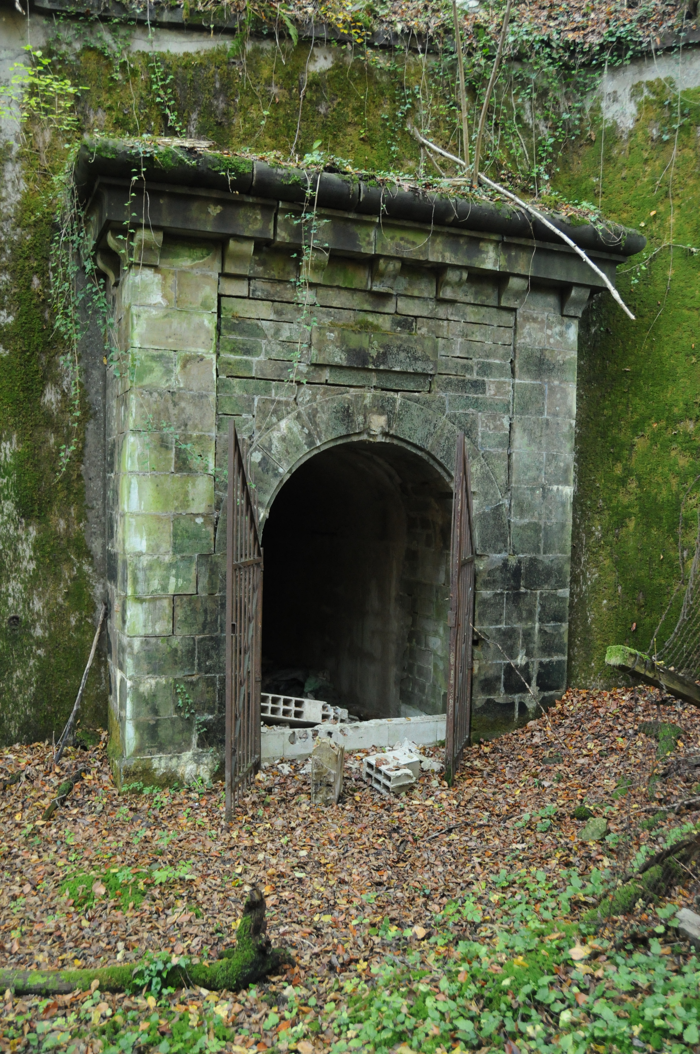 Bois d'Oye fortifications.